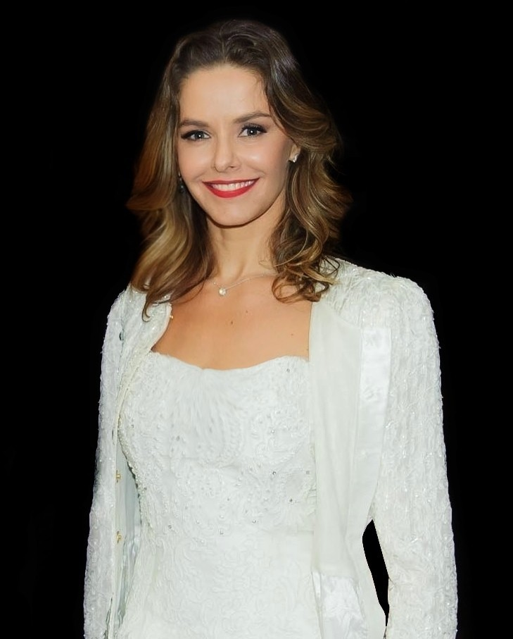 Bianca Rinaldi em 2015.